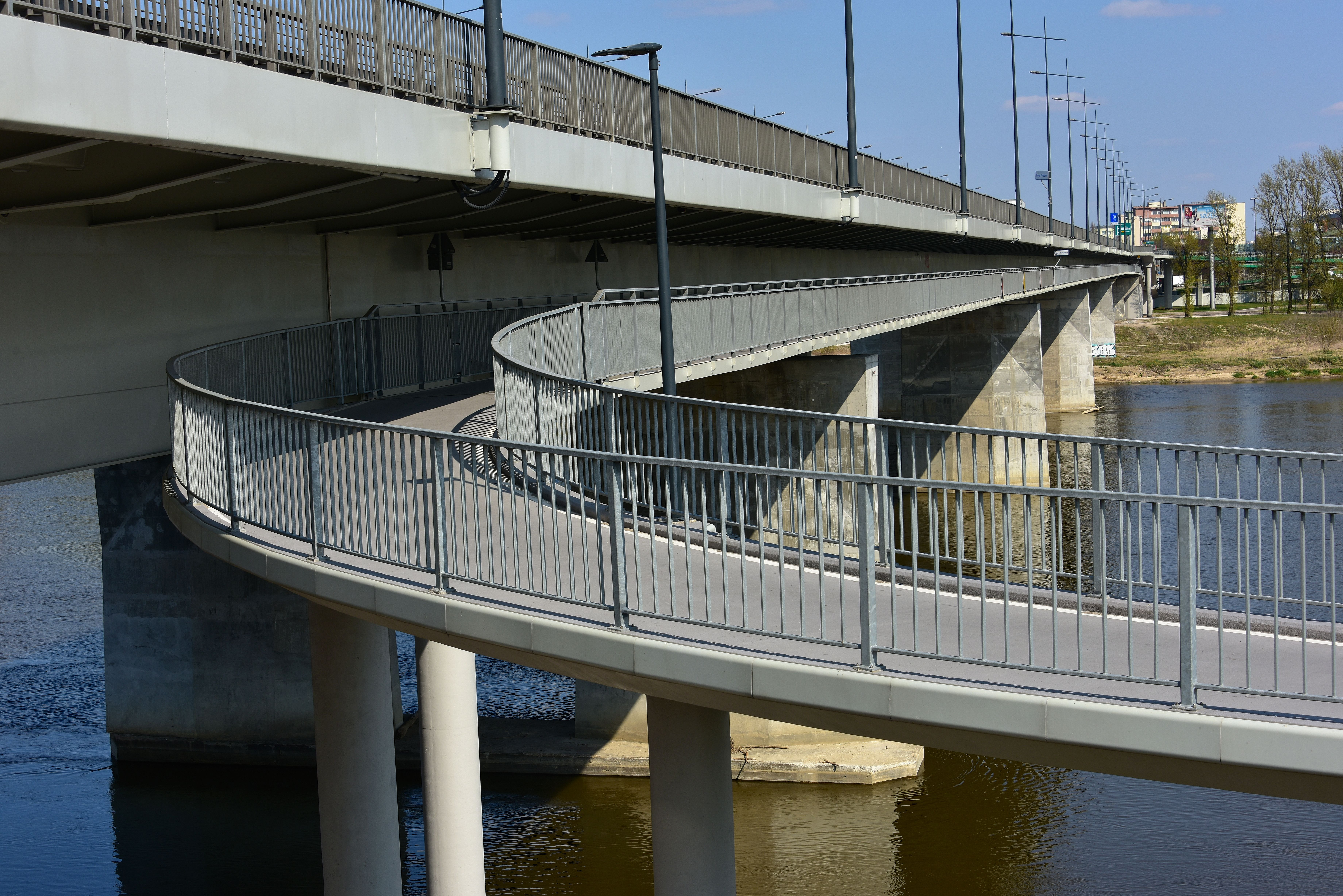 Most Łazienkowski w Warszawie. Kładka rowerowa